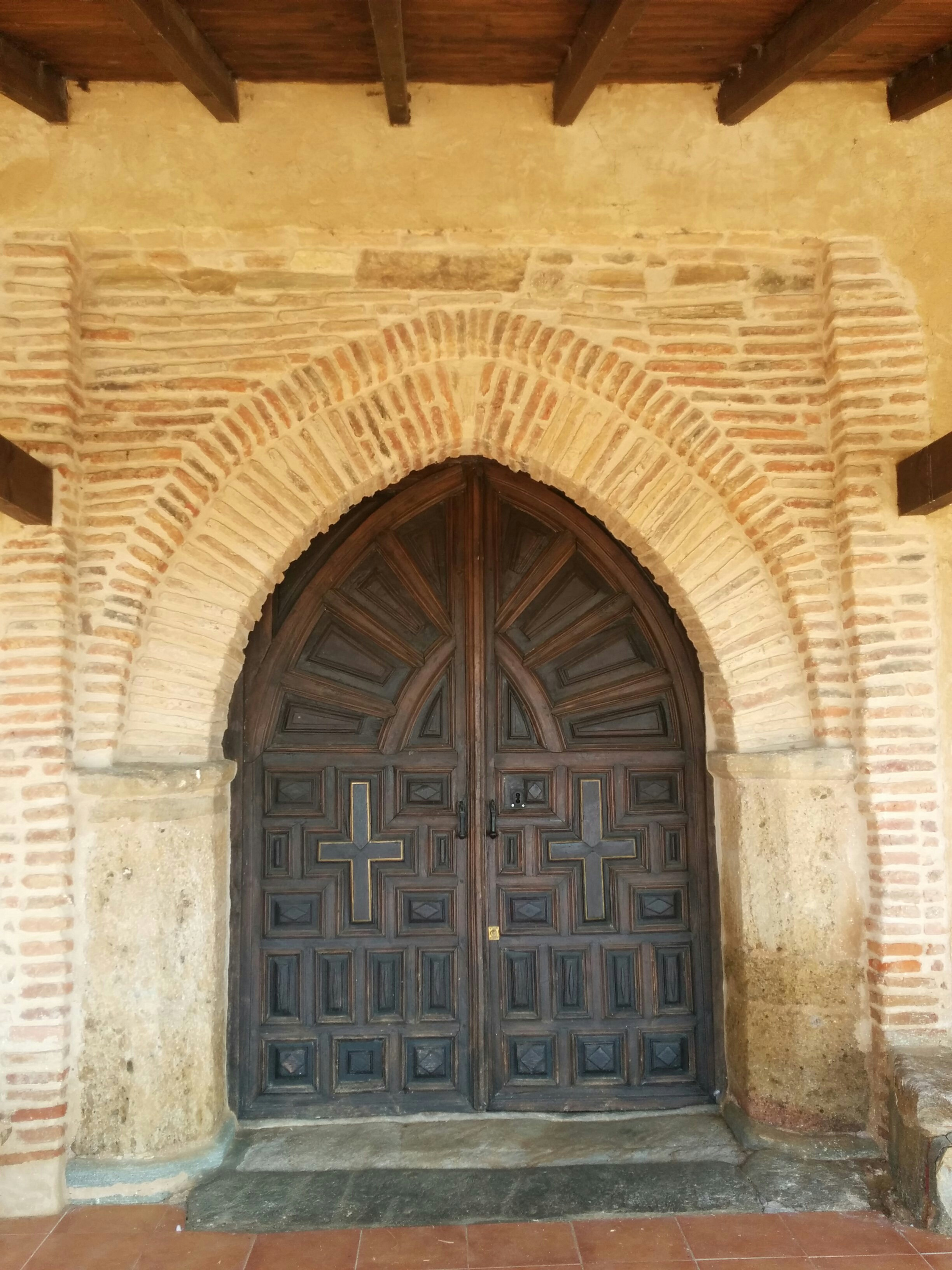 Puerta de la Iglesia de Santa María de la Antigua (León)